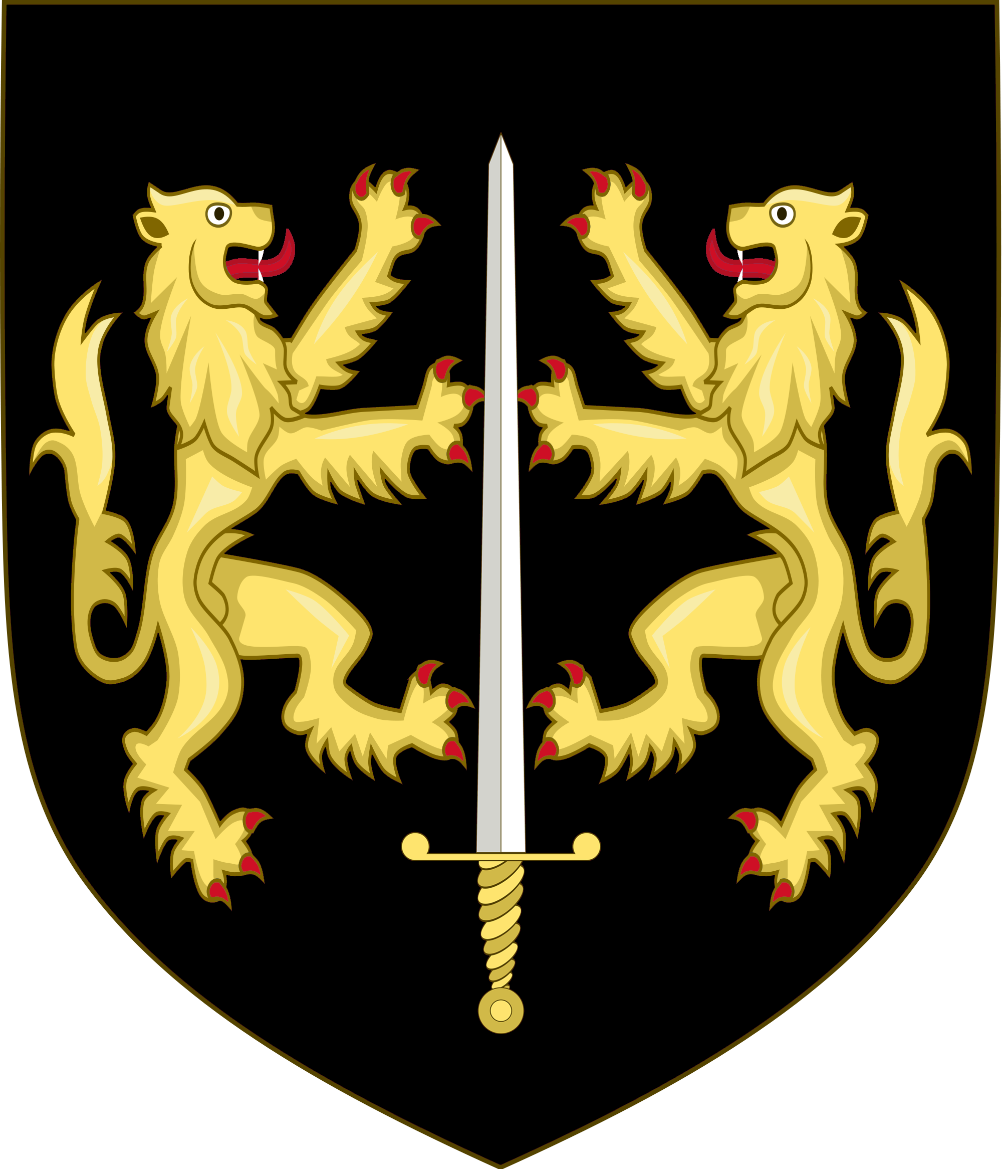 O'Carroll.